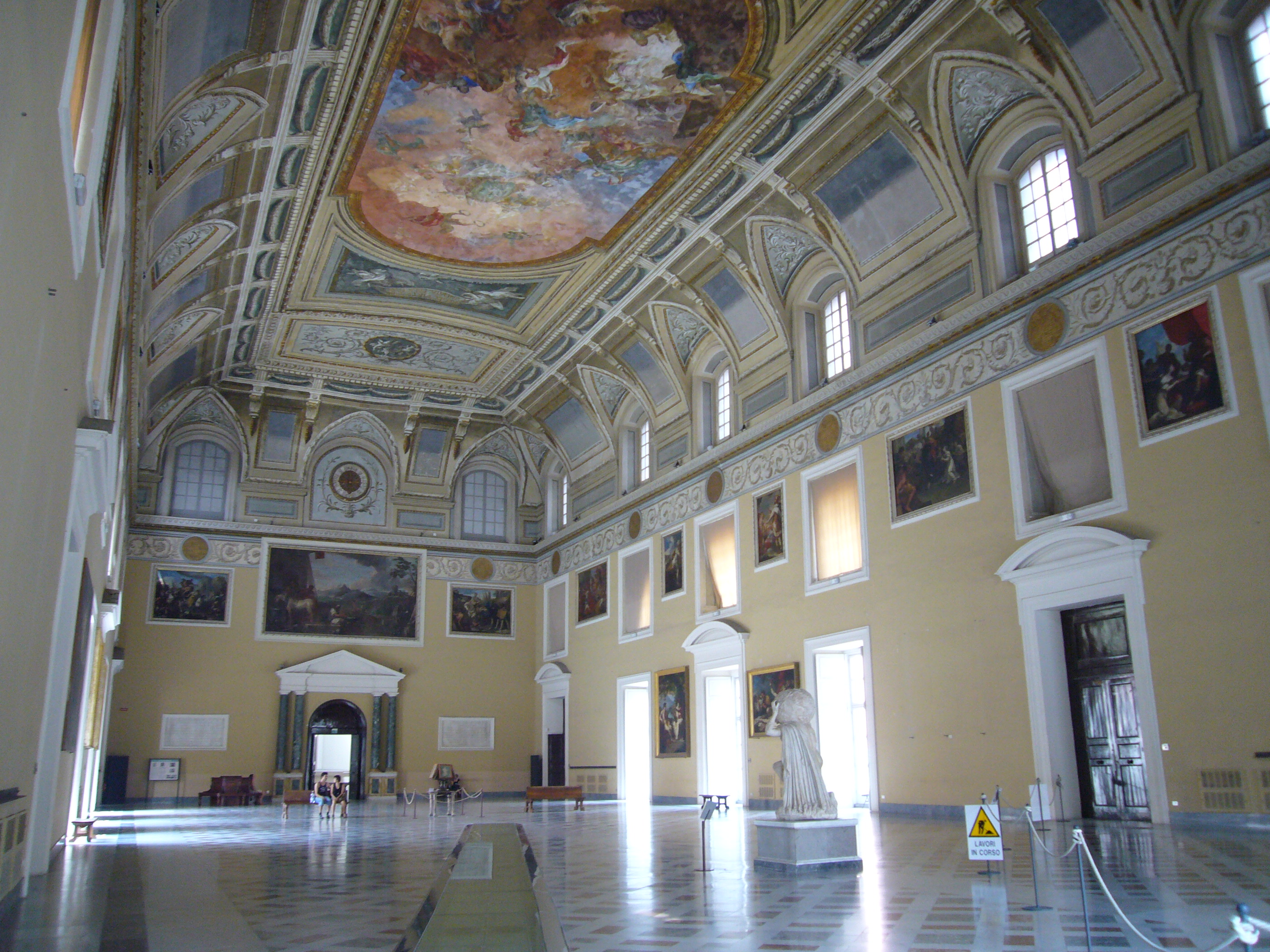 Museo archeologico nazionale di Napoli: il Salone della Meridiana, opera dell'architetto Giovanni Antonio Medrano. In primo piano, sul pavimento, la meridiana. Poco distante (di spalle) la statua dell'"Atlante Farnese".